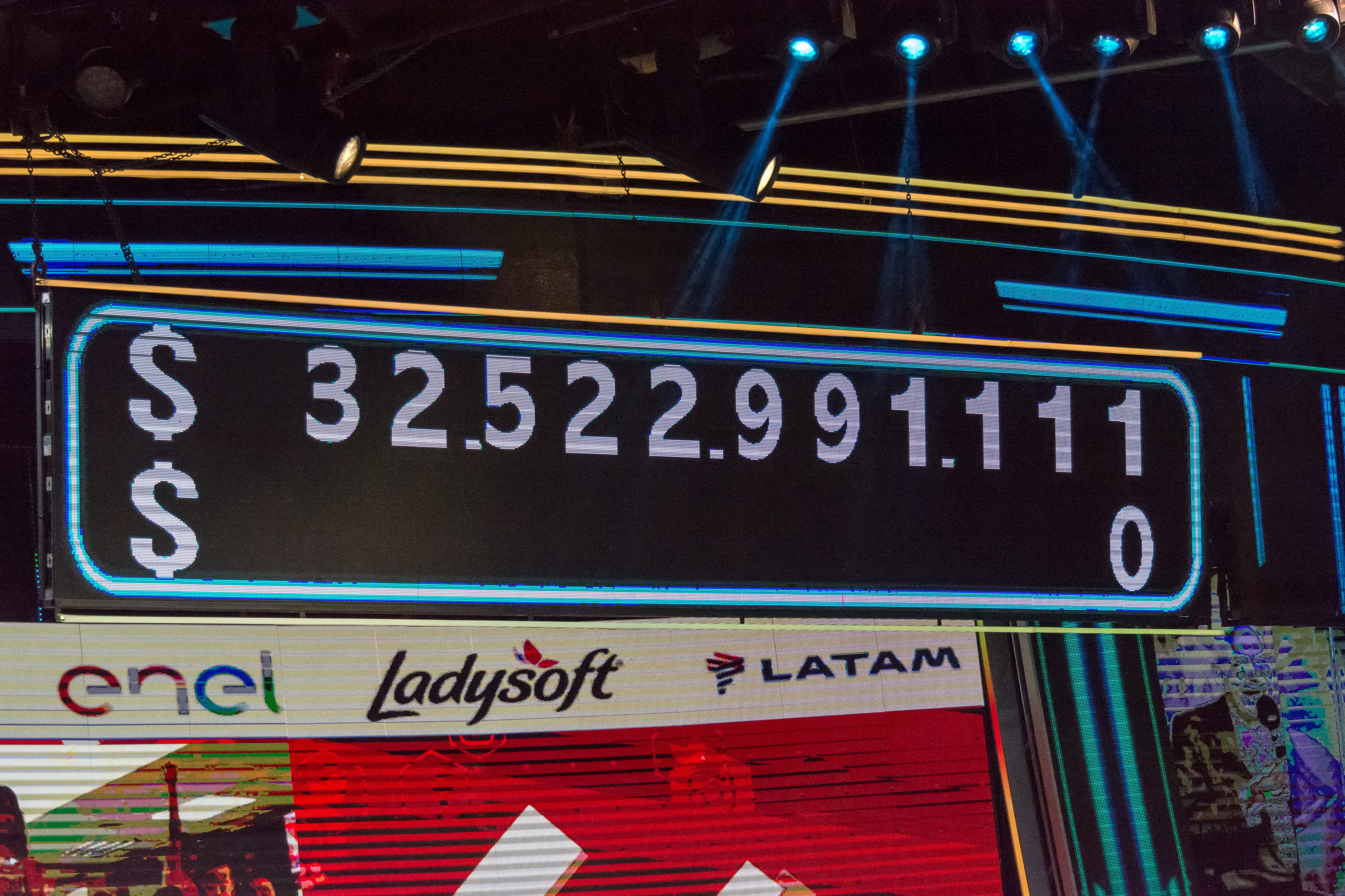 Meta, Teletón 2018, Teatro Teletón, Santiago, Chile.